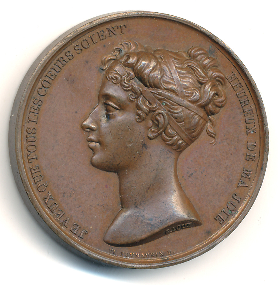 Médaille en bronze, 38mm, 33g, gravée par Caquée